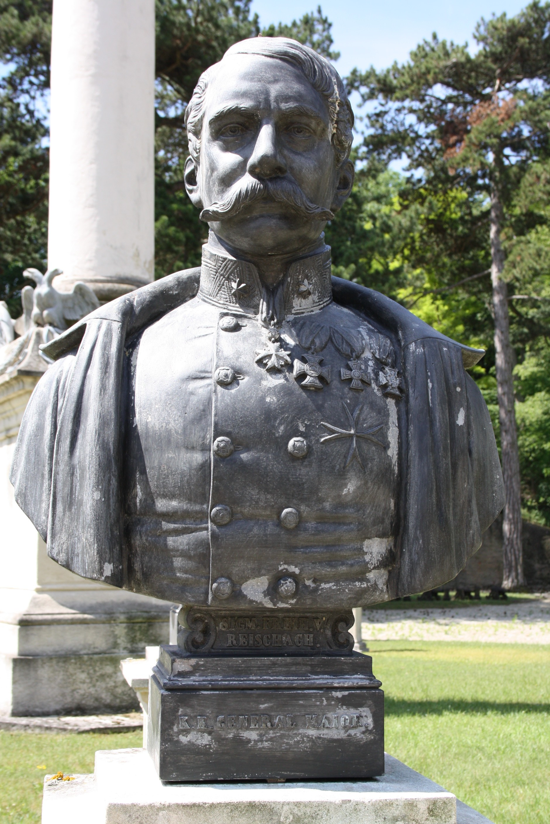 Büste in der Gedenkstätte Heldenberg (Niederösterreich)